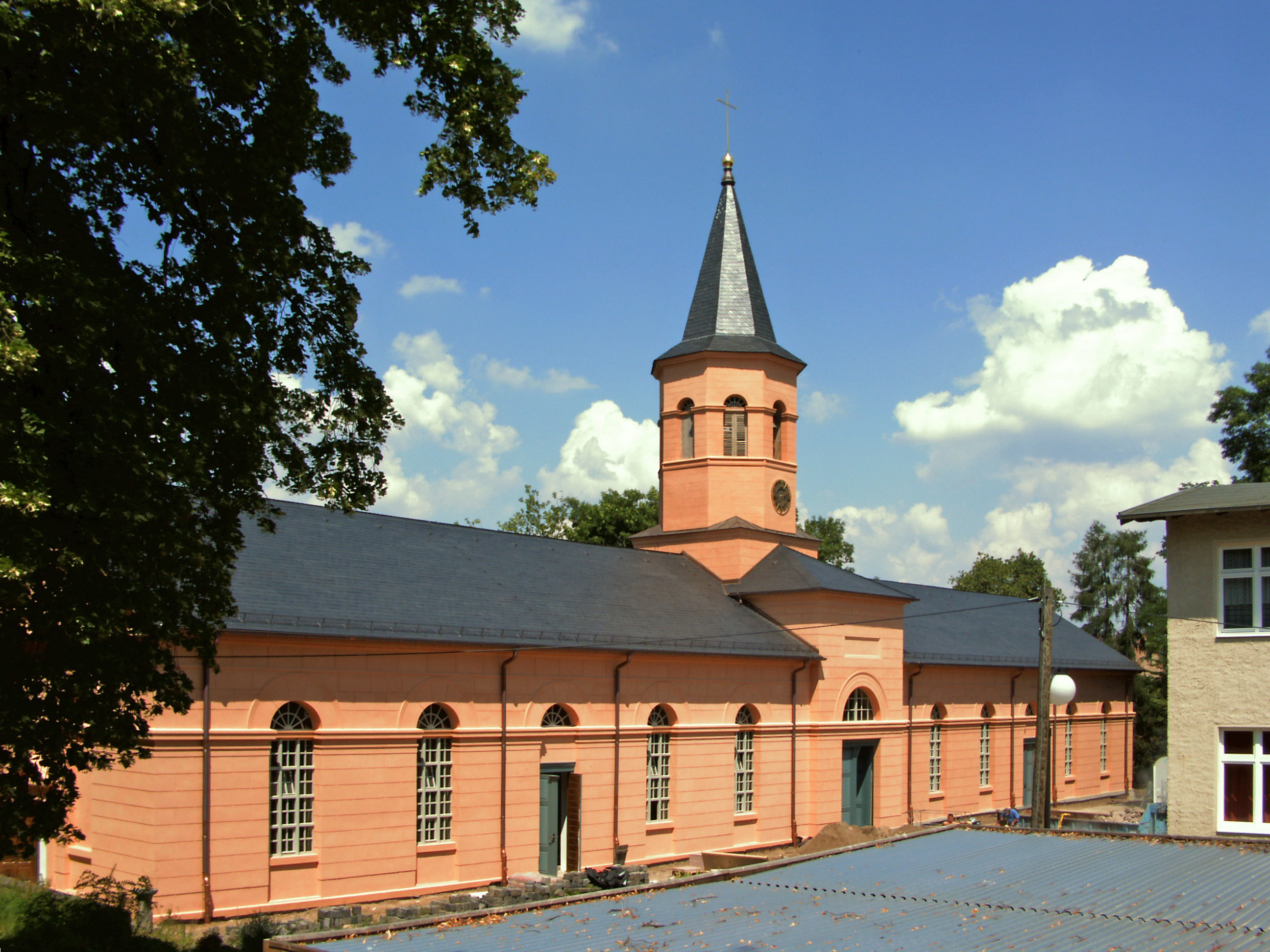 Simultankirche Althaldensleben, Stadtteil von Haldensleben